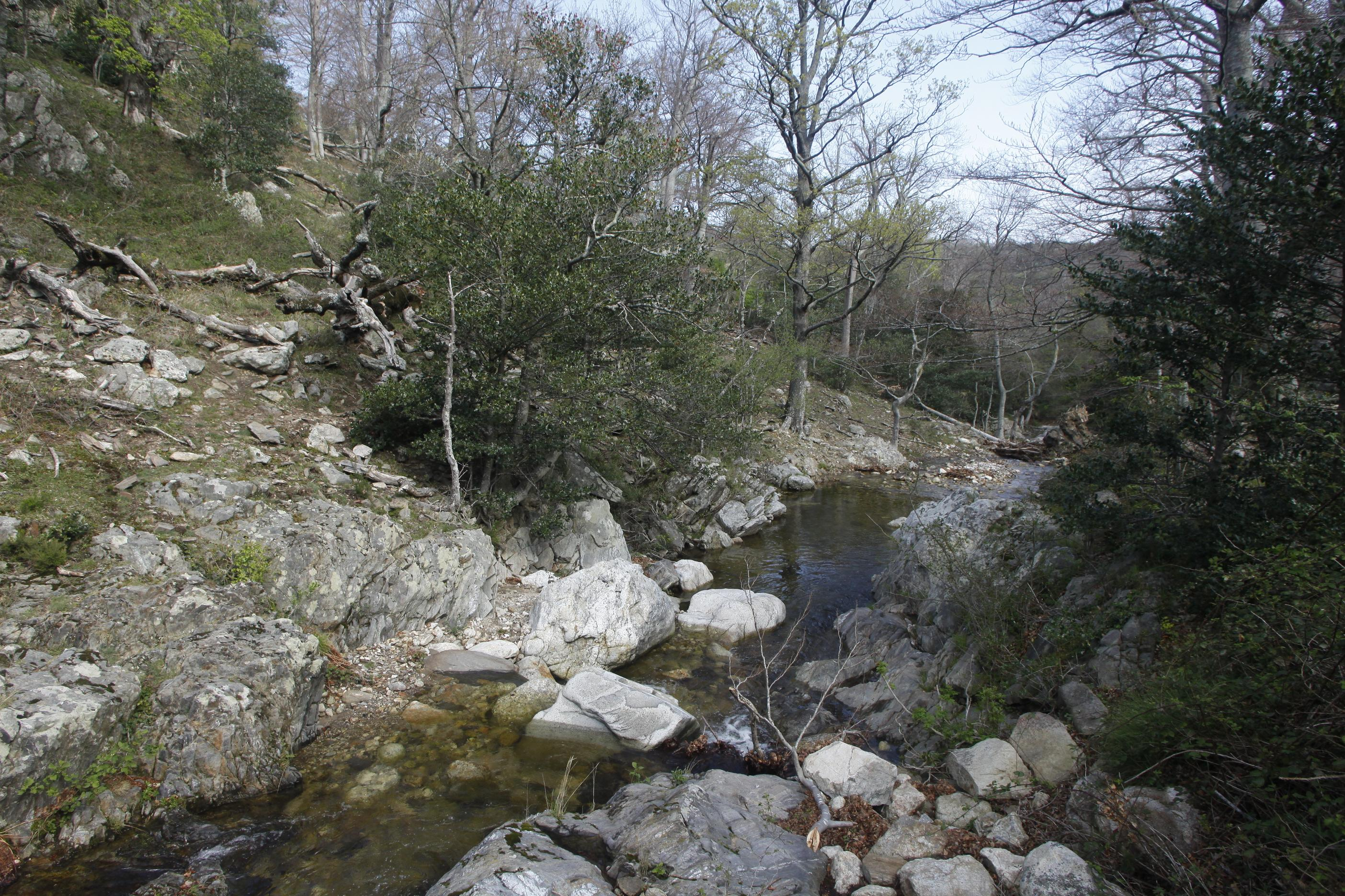 La rivière Massane dans les Pyrénées Orientales